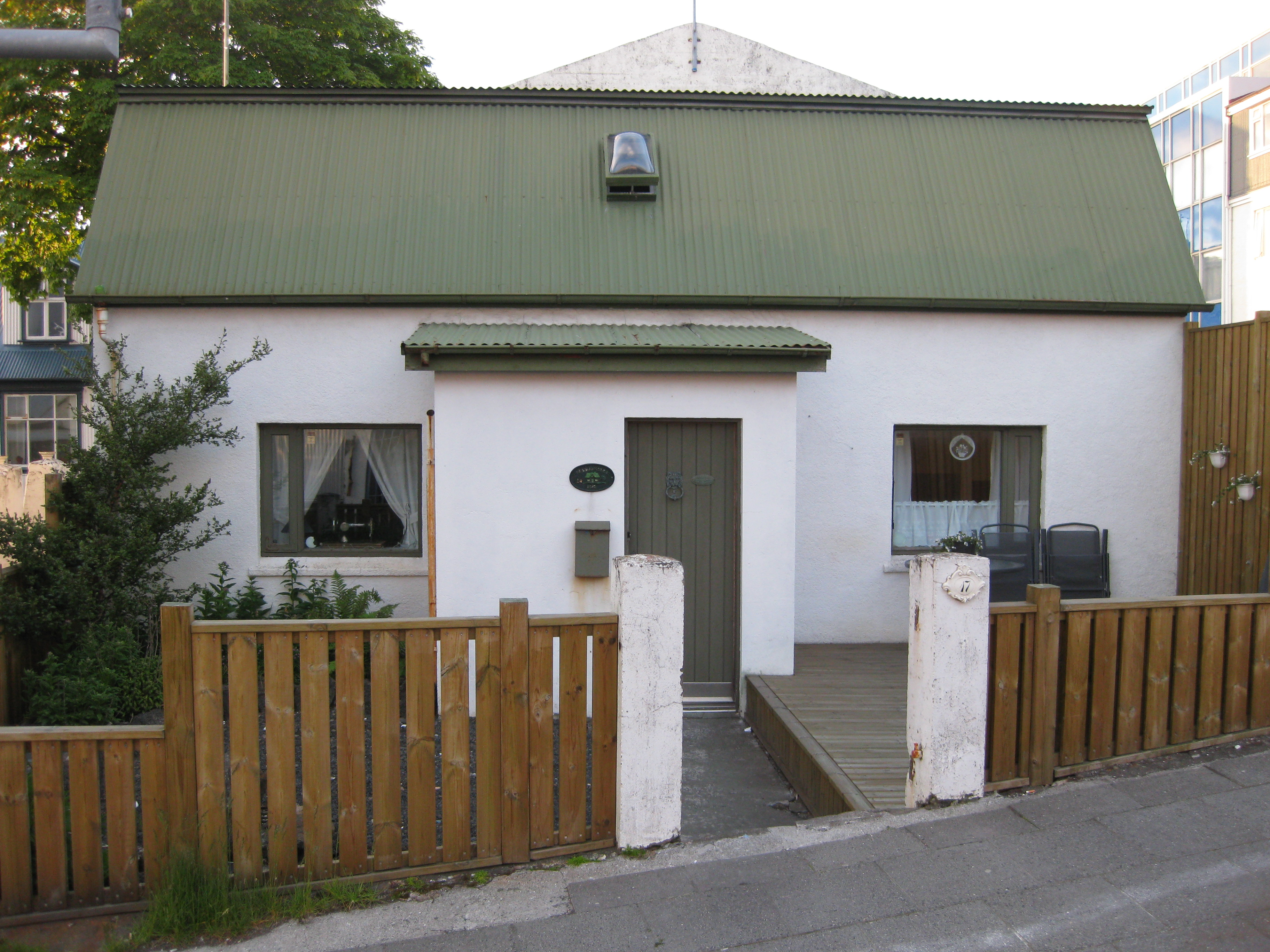 Steinbær í Reykjavík